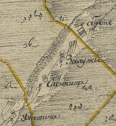 Деревня Слонница Холмского уезда Псковской губернии и её окружение на плане Генерального межевания Холмского уезда ок. 1780-1790-х годов масштаба в 1 английском дюйме 2 версты. (д. Ухашина (Ухошино), д. Залужье, д. Борокь (Борок), р. Полиста (Полисть), жёлтым - линия межевания